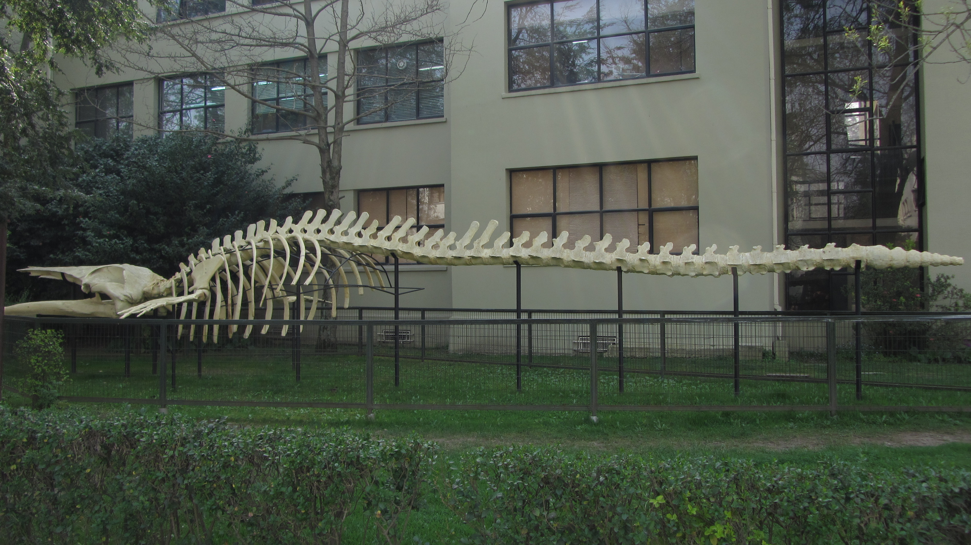 Esqueleto de Balaenoptera physalus Último especimen cazado en el Golfo de Arauco, el 21 de mayo de 1983. Campus central de la Universidad de Concepción Concepción, Chile